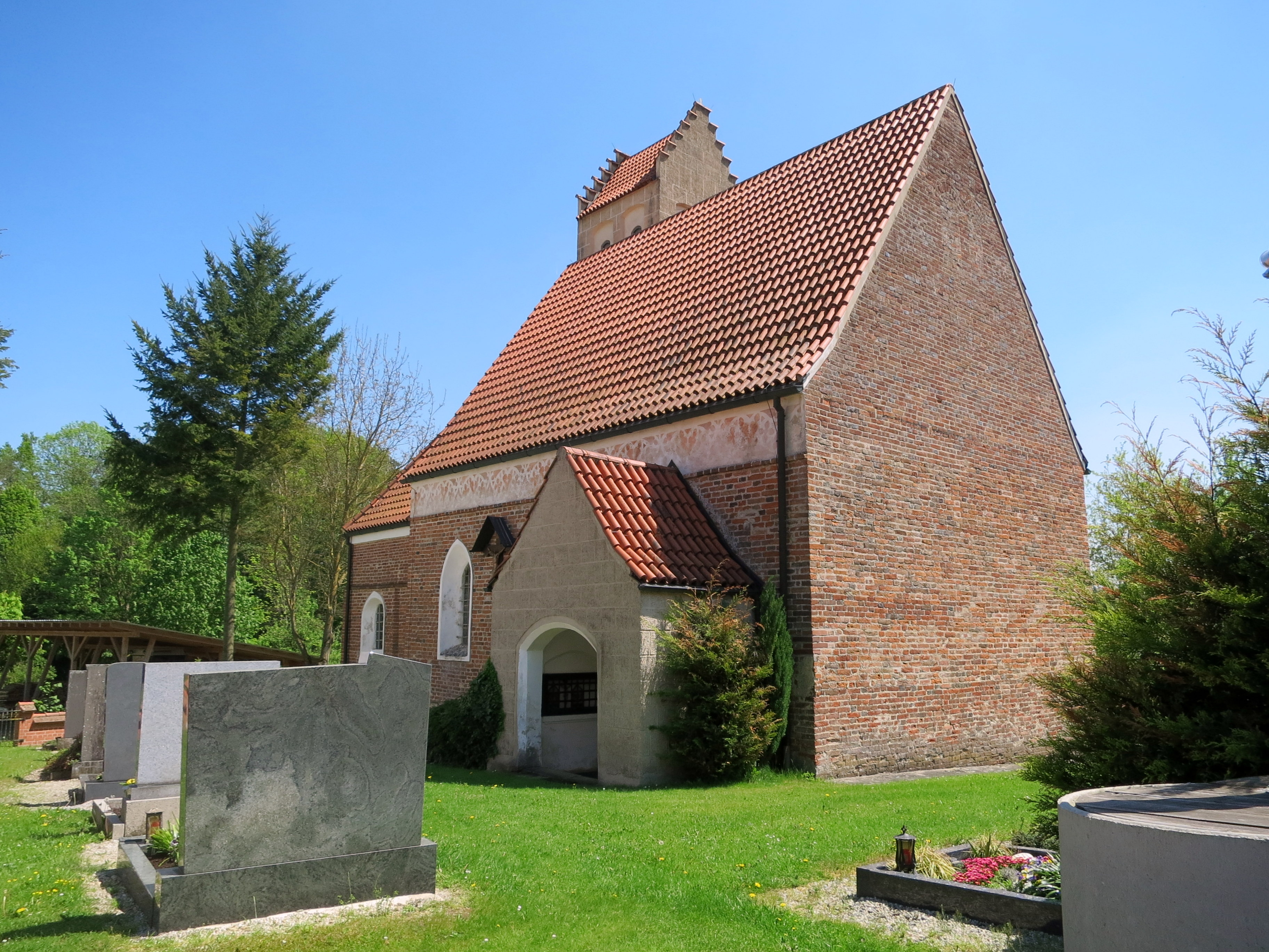 Eine spätgotische Backsteinkirche mit kräftigem Turm